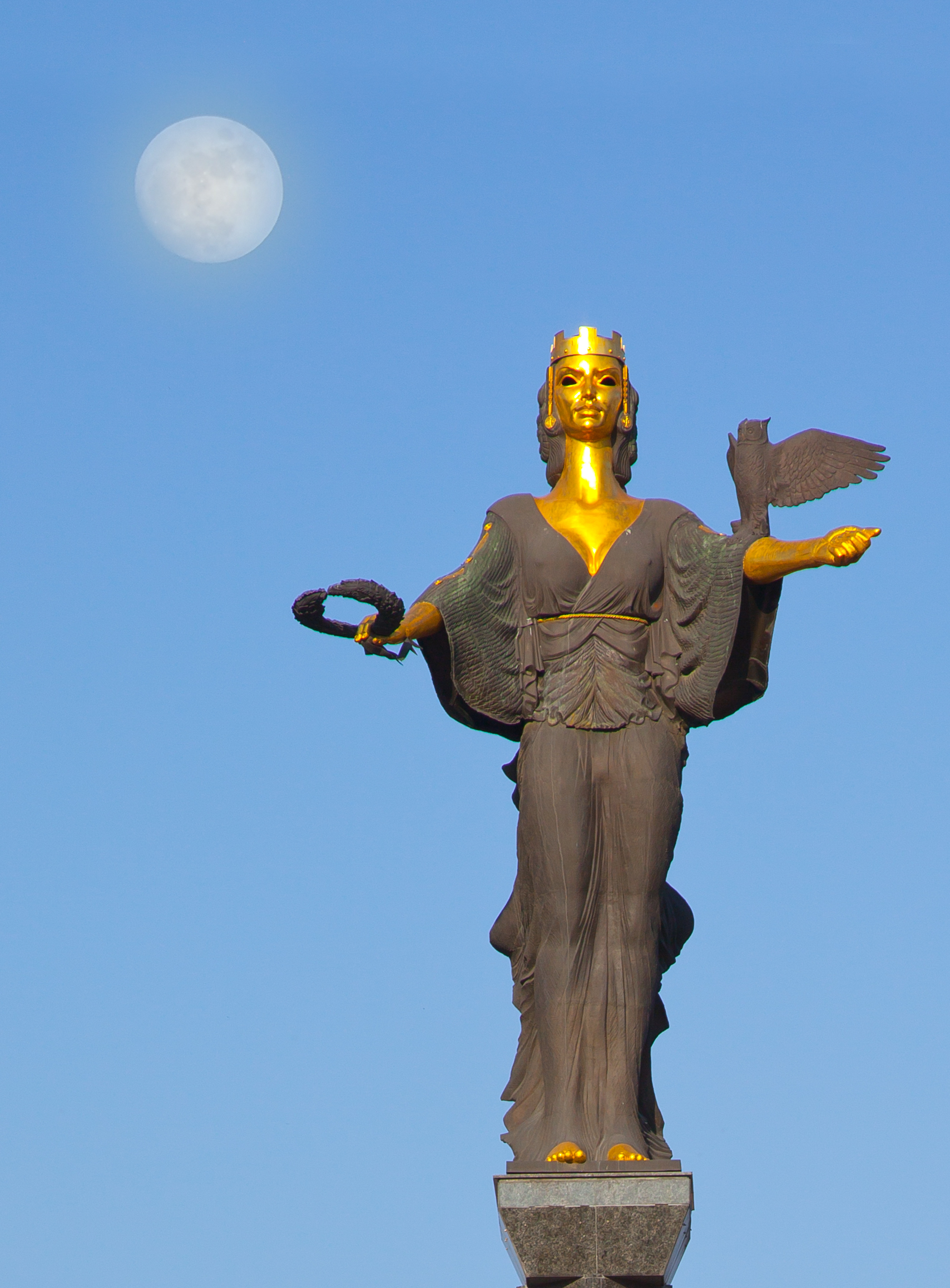 Statue der Heiligen Sofia (Sofia ist jedoch nach der Kirche Heilige Sofia benannt, nicht nach der Heiligen Sofia direkt), Sofia